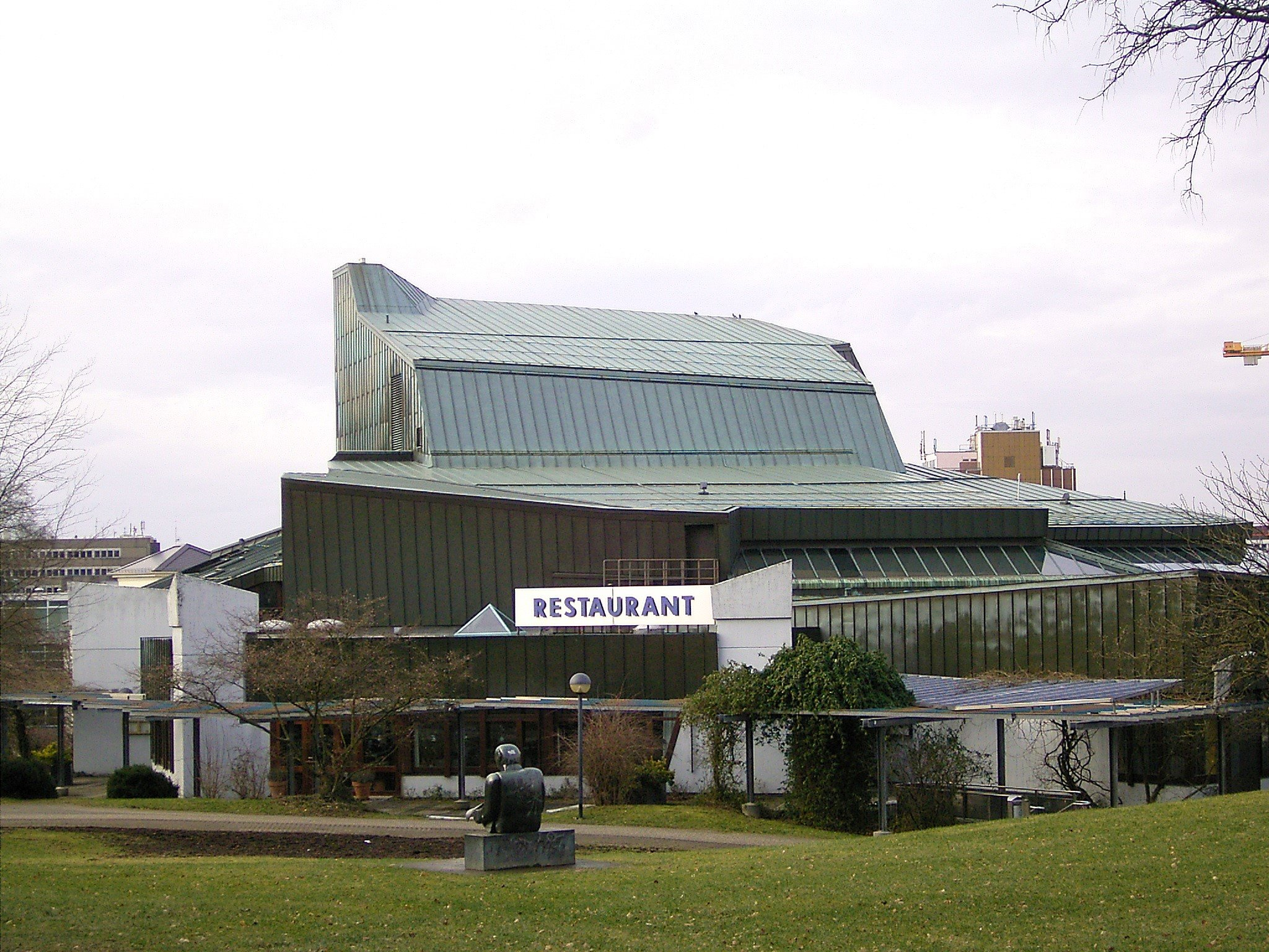 Lüdenscheid